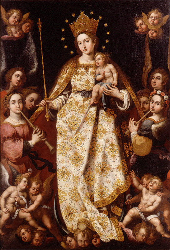 La obra representa a la Virgen María llevando en brazos a su hijo, el Niño Jesús, y acompañada por unos ángeles que portan instrumentos musicales.